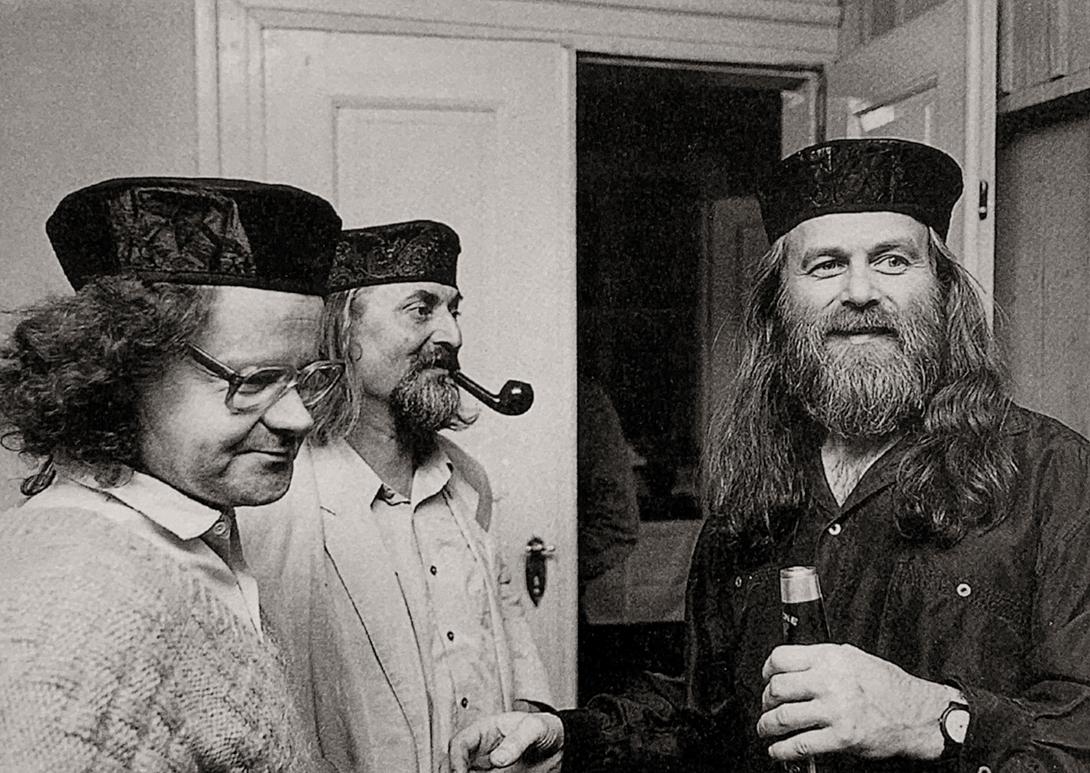 Jochen Lorenz, Eberhard Göschel und Bernhard Theilmann (v.l.n.r.) im Haus/Atelier Rietzstraße 14 in Dresden